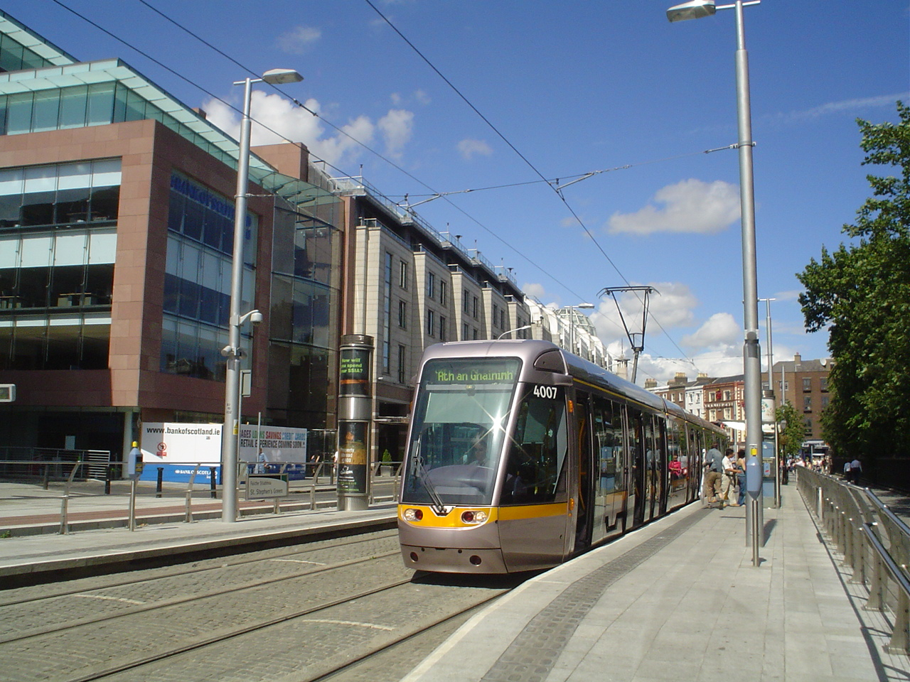 Dublin LUAS tram car